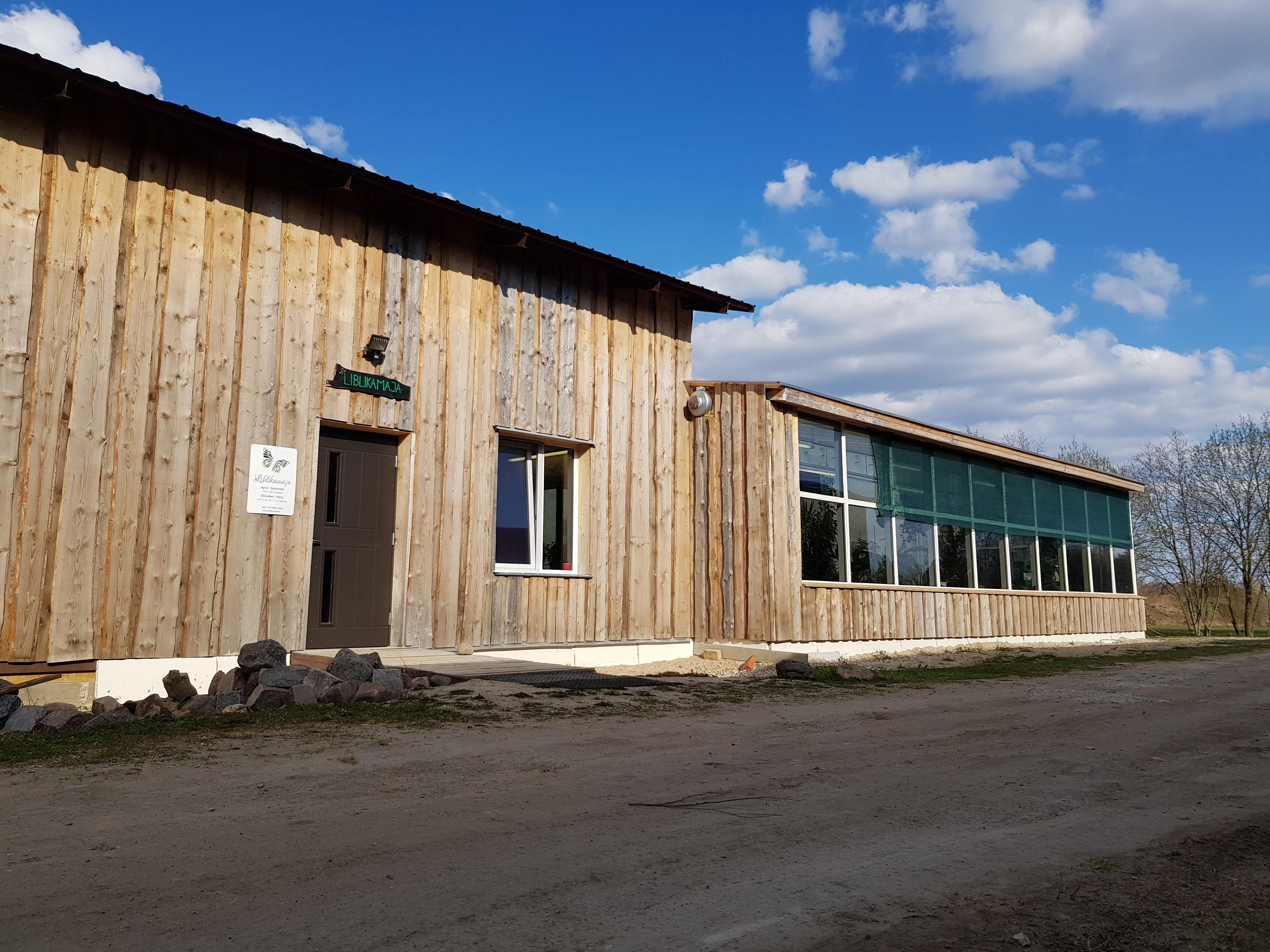 Kiisamaa seiklus- ja looduspargi Liblikamaja Jaani talus Lääneranna vallas Pärnumaal.